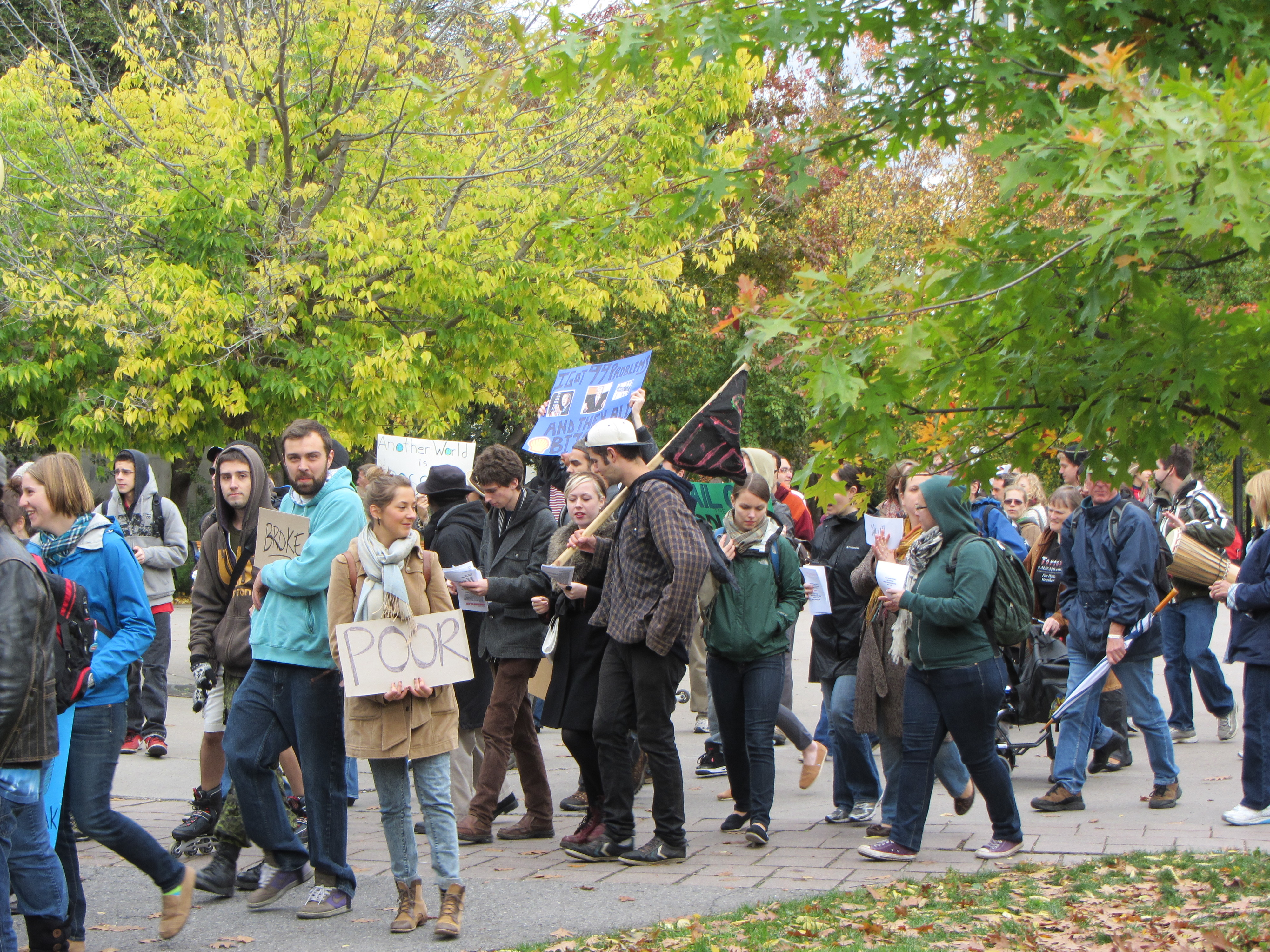 Broke & Poor